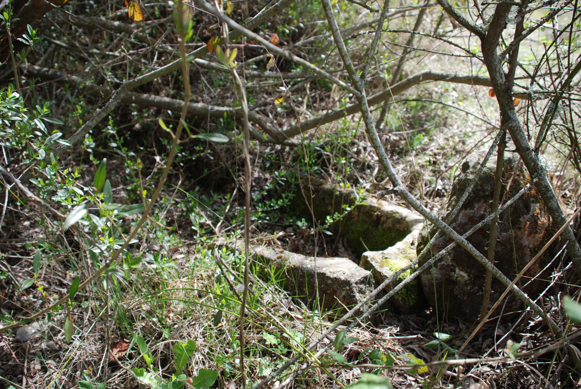 Restos de sarcófago en el lugar en el que se encontraba el antiguo Monasterio de Valcavado. Monasterio de origen medieval que estaba situado a los pies del río Carrión, en el termino de Villaires (Provincia de Palencia), perteneciente actualmente al municipio de Saldaña. Estos restos pertenecen a una prospección efectuada en 1967 por D. José María Caballero González, vecino de Saldaña. en dicha prospección se encontraron hasta 9 sarcófagos como este, fechados entorno a los siglos X y XI, en opinión de su descubridor.